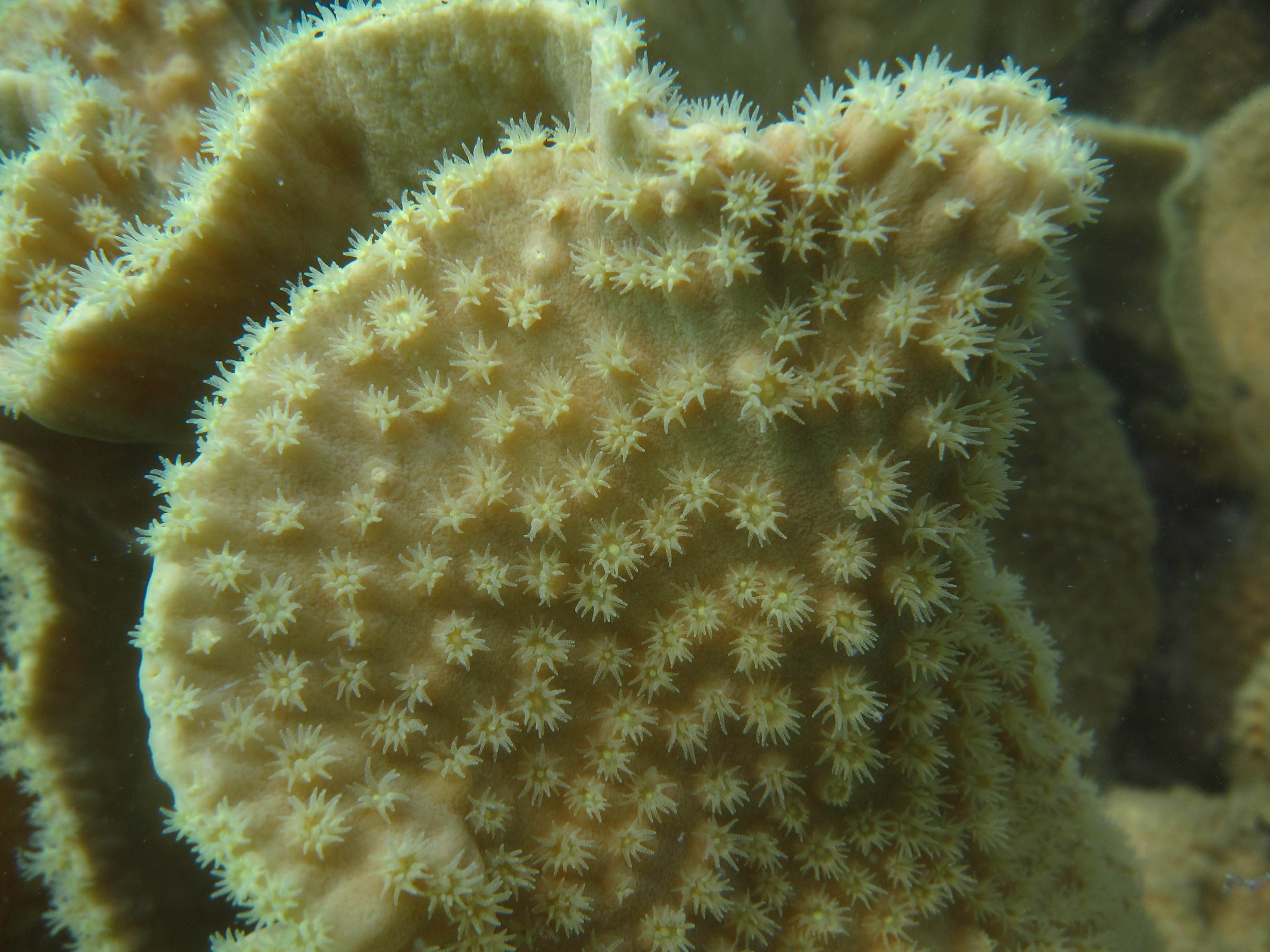 Turbinaria reniformis, vista de coralitos con tentáculos expandidos. Isla Lizard, Australia.